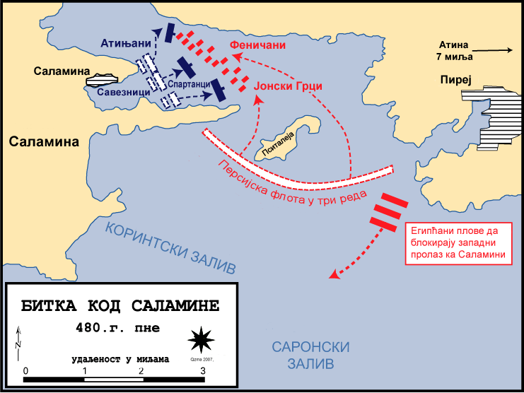 Слика је прерађена у српску верзију. Назив оригинала је Battle of salamis.png Потиче са Military Academy of West Point website, ancient warfare subpage